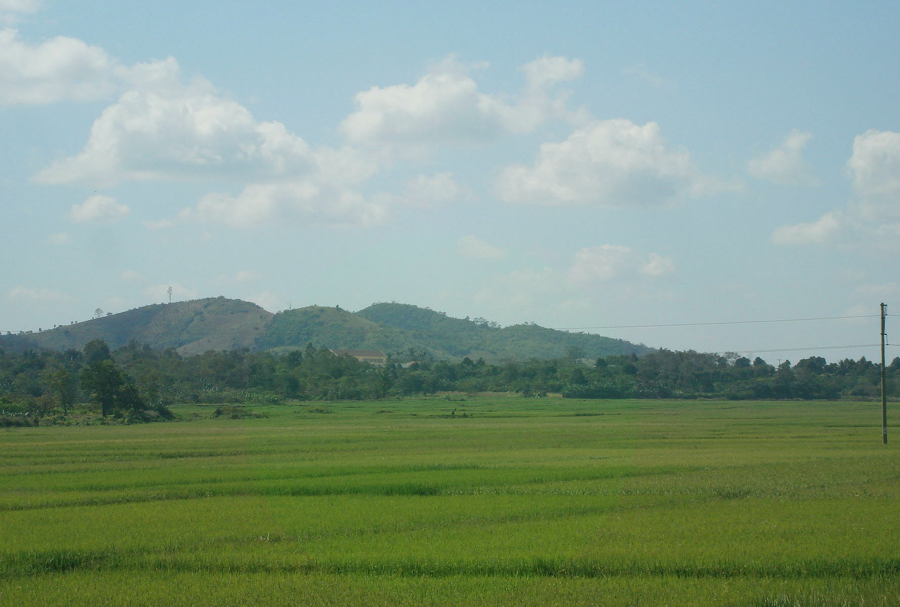 Xã Dray Sáp